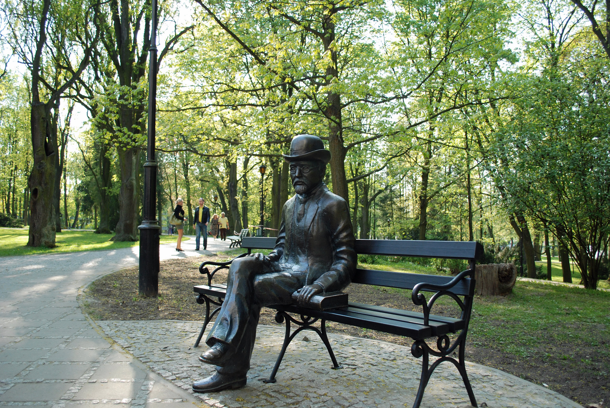 Nałęczów. Ławeczka B. Prusa